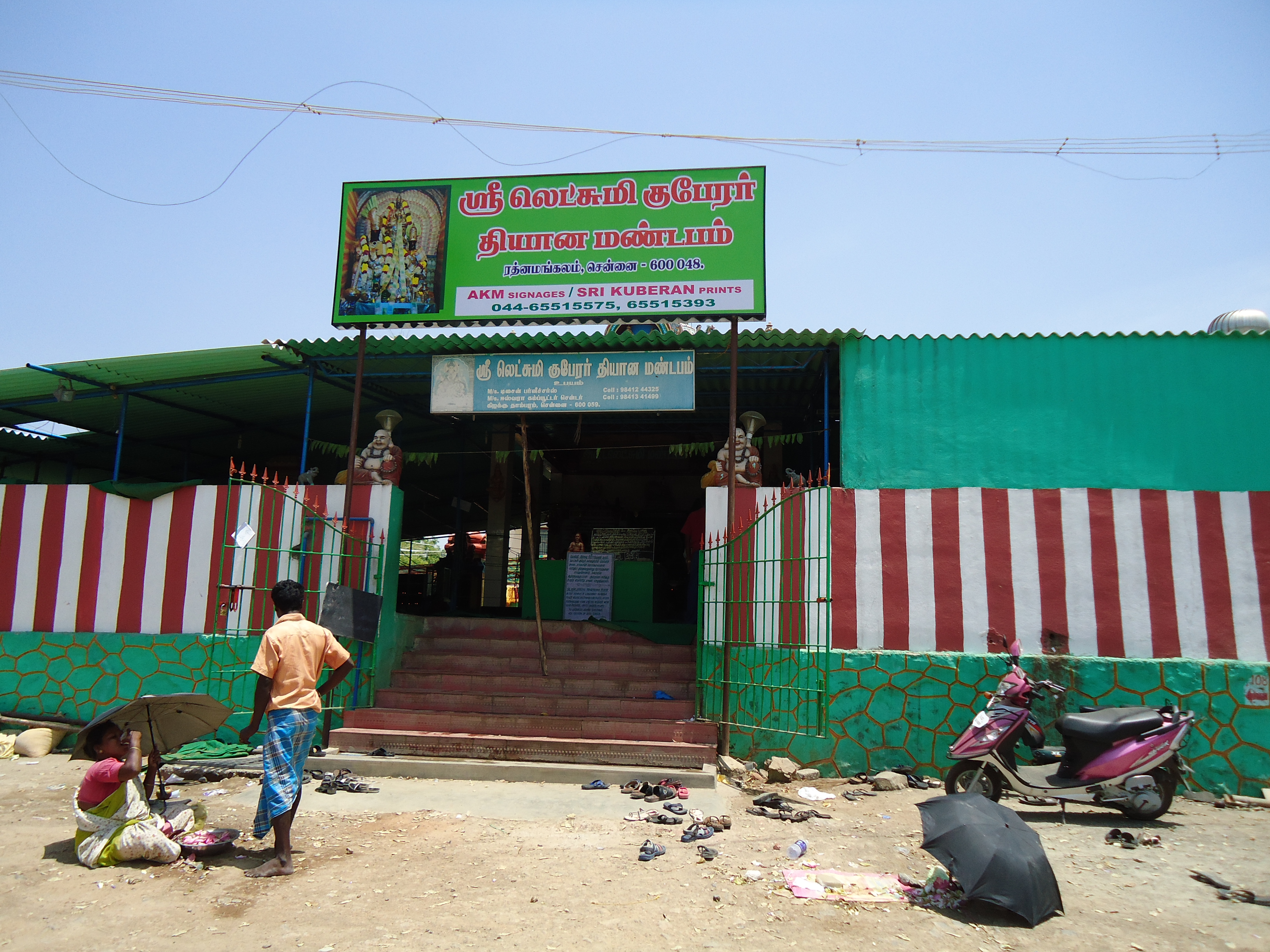 லட்சுமி குபேரர் கோயில் வண்டலூர் அருகே உள்ள ரத்தினமங்கலத்தில் உள்ளது.